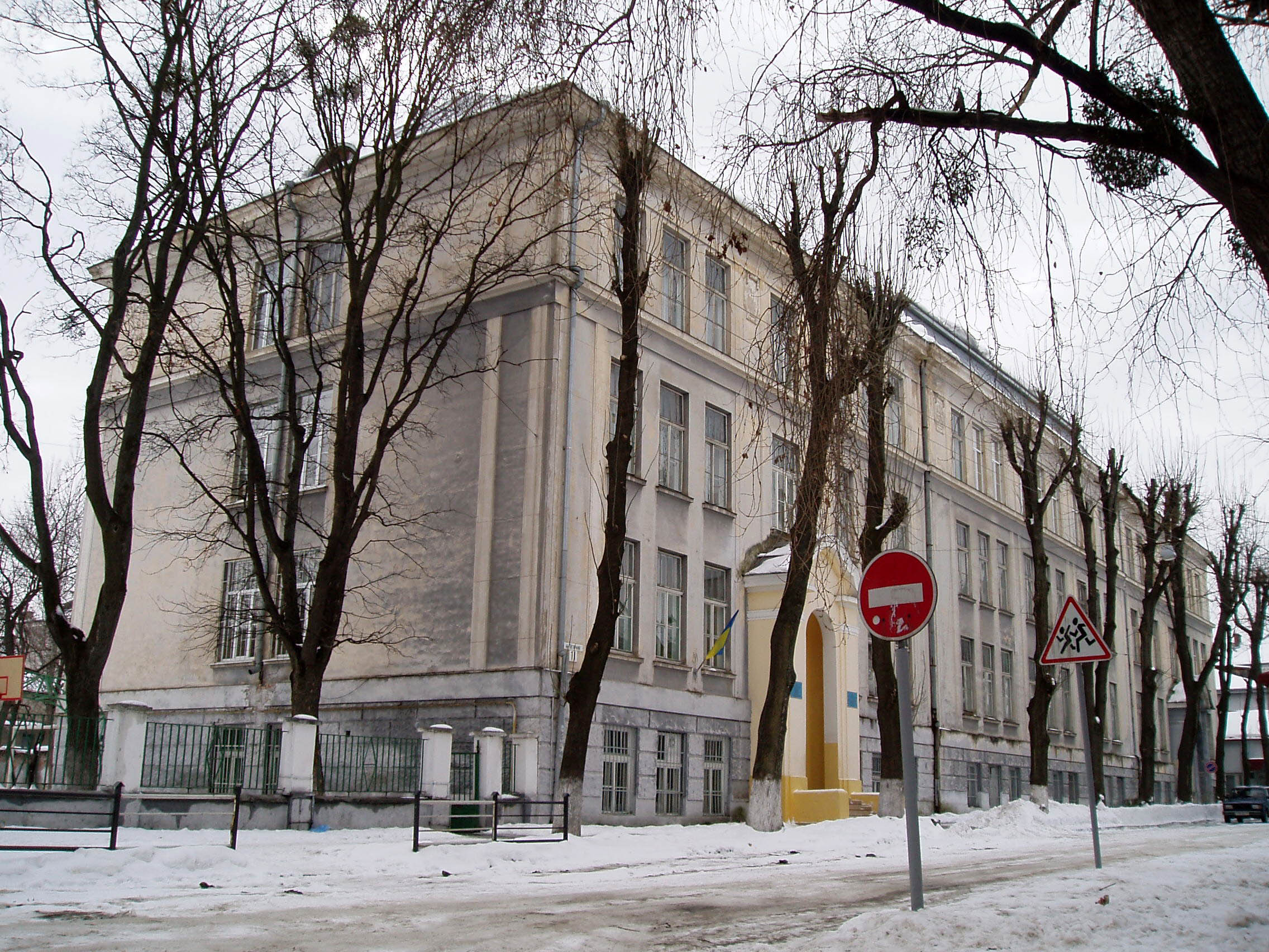 Гімназія "Престиж" на вулиці Ветеранів у Львові. Архітектор Генрик Заремба.